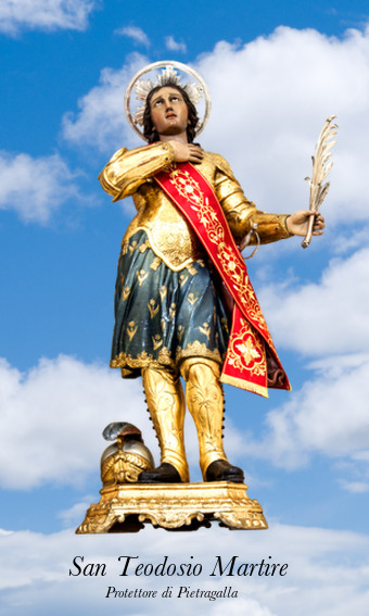 INNO A SAN TEODOSIO MARTIRE Inni al glorioso Santo s'innalzino dal cuore da noi cui grande amore e protezion donò. Dal cielo veglia il popolo e guida tra i perigli i tuoi fedeli figli difendi, o Protettor... Proteggi le famiglie il vecchio e l'innocente; richiama a penitenza il cuore che sviò. Dal Cielo veglia il Popolo e guida tra i perigli i tuoi fedeli figli difendi,o Protettor... PREGHIAMO "Chi viole amare la vita e vedere giorni felici trattenga la lingua dal male e le labbra da parole d'inganno; eviti il male e faccia il bene, cerchi la pace e la segua, perchè gli occhi del Signore sono sopra i giusti e le le Sue orecchie sono attente alle loro preghiere; ma il volto del Signore e contro coloro che fanno il male". (1 Pt 3, 10-12)